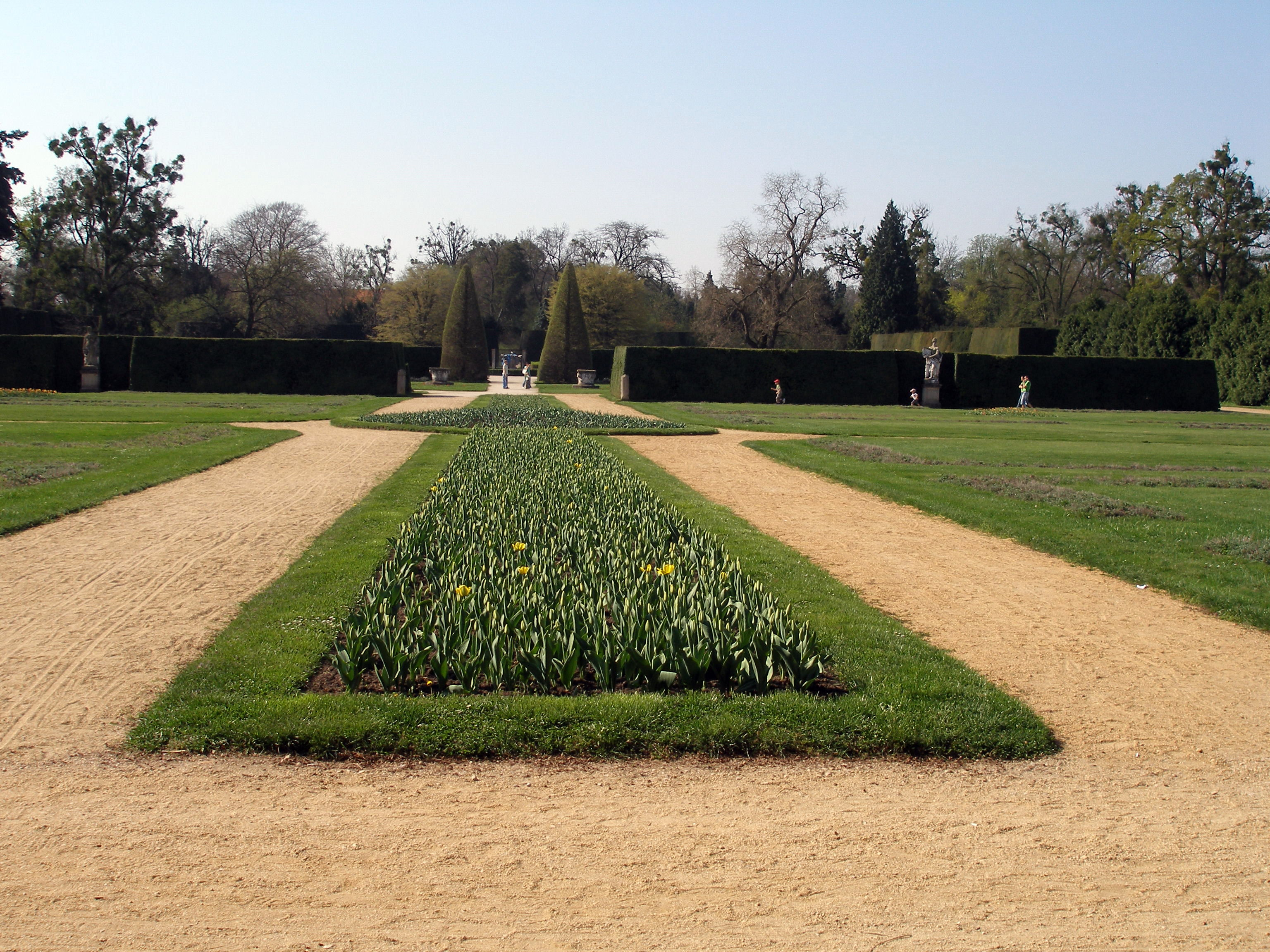 Štátny zámok Lednice na Morave Česká republika